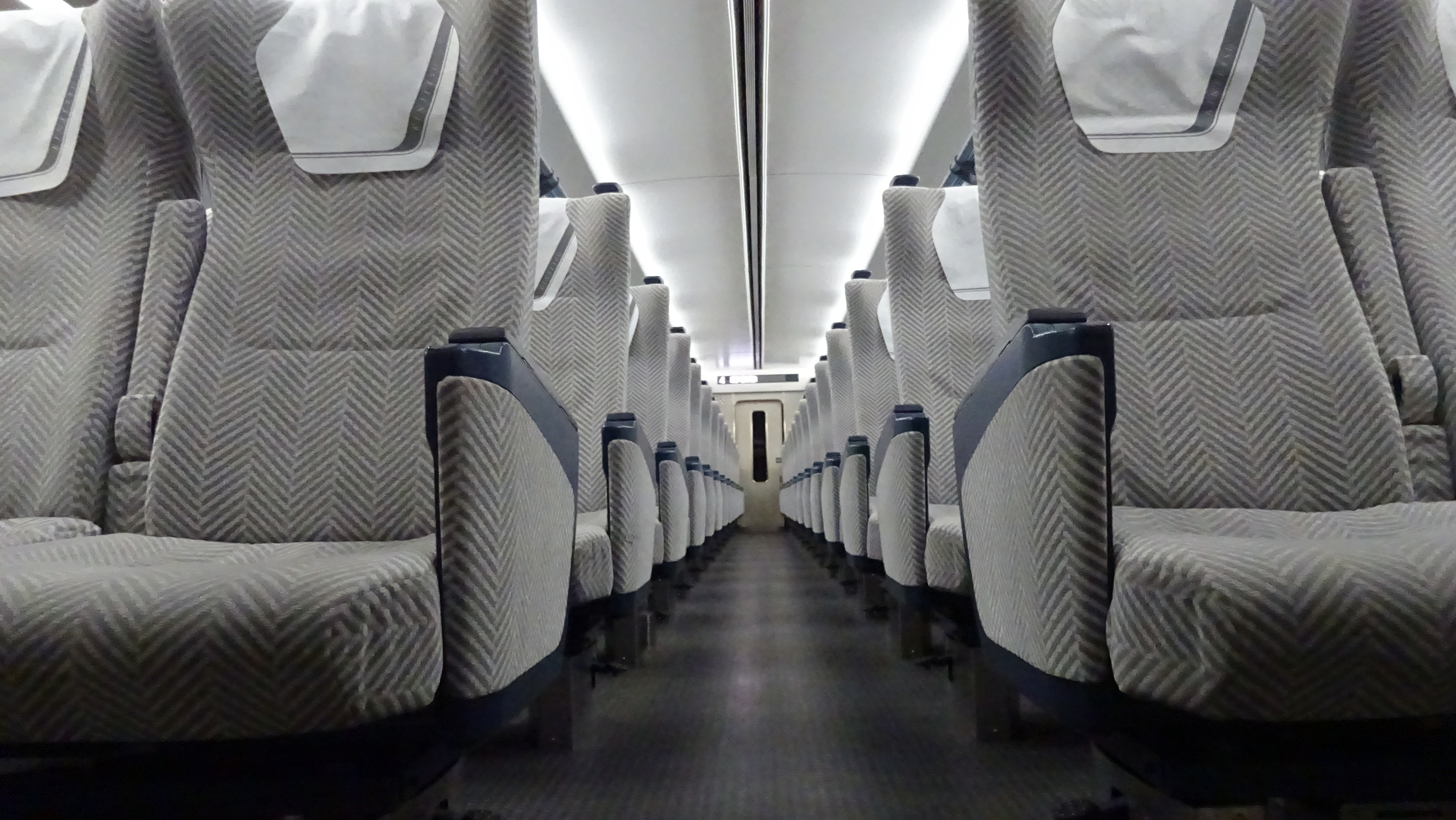 リニューアル後の車内